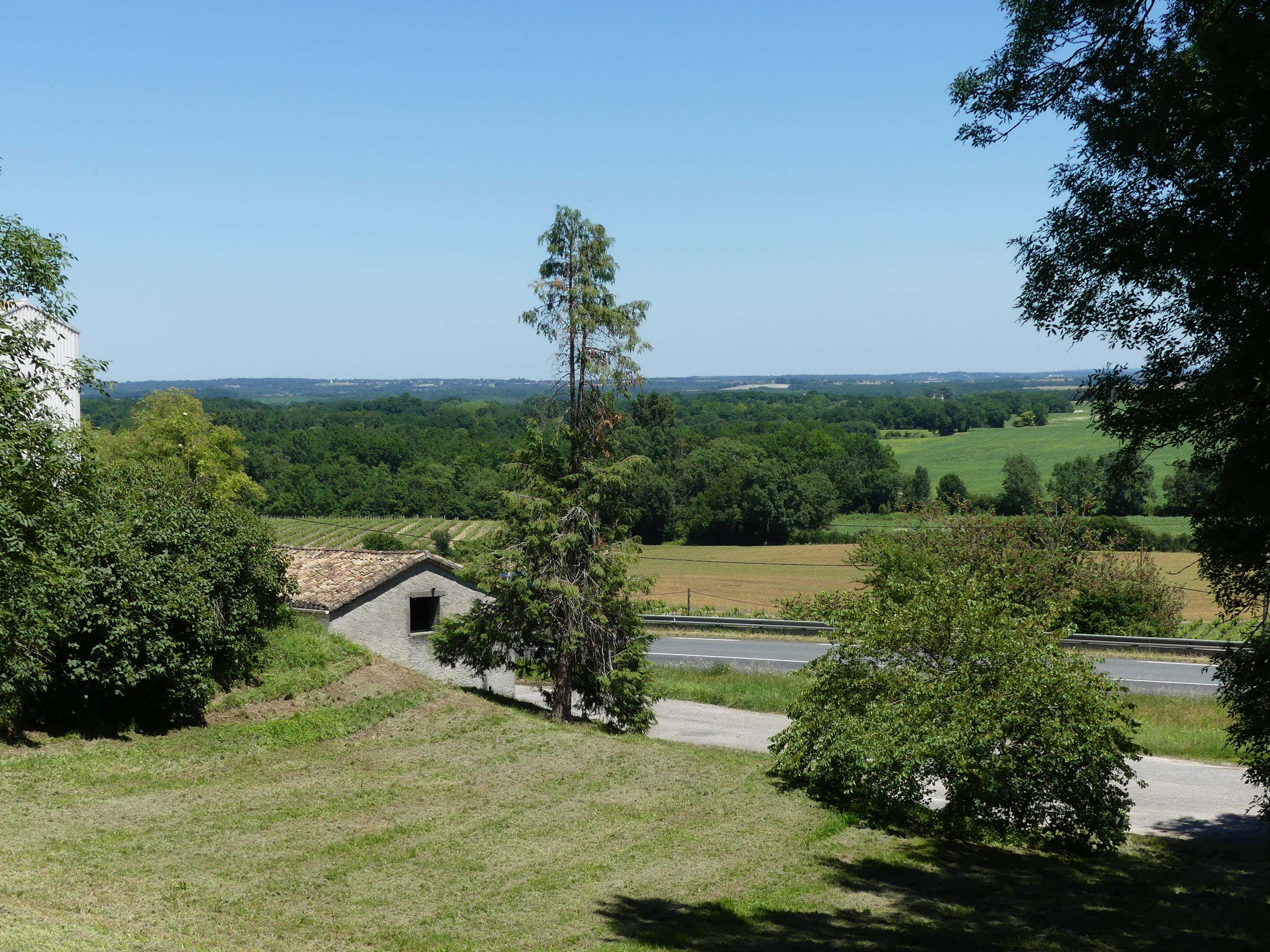 Vue sur la route nationale 21 et la Grande Font depuis le bourg de Saint-Perdoux, Dordogne, France.